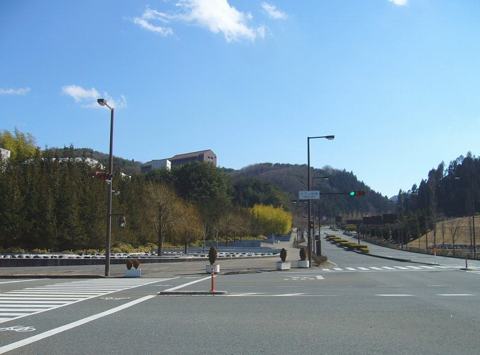 播磨科学公園都市 テクノ中央交差点（上郡町光都2丁目）